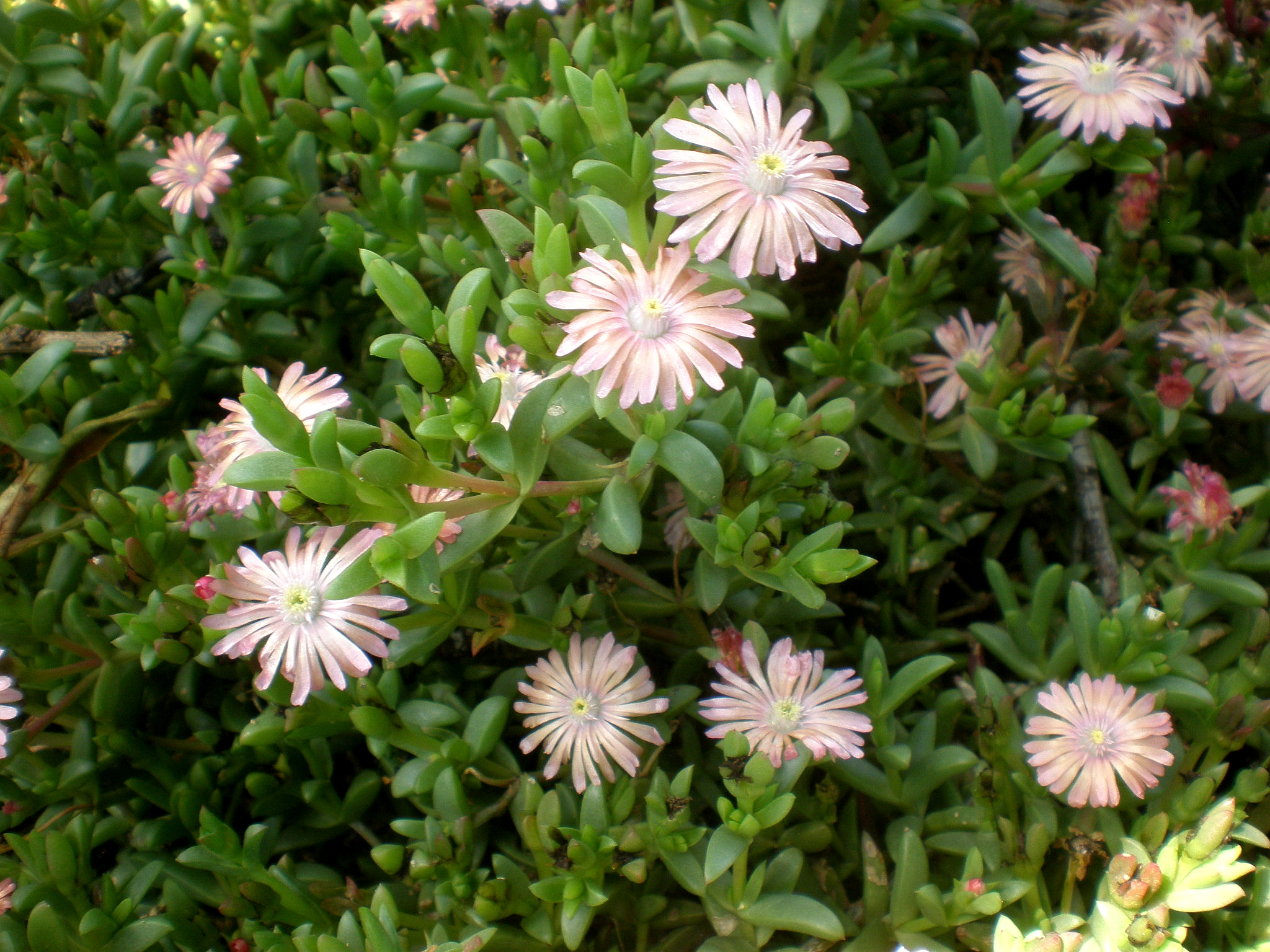 Jardín Botánico de Barcelona.